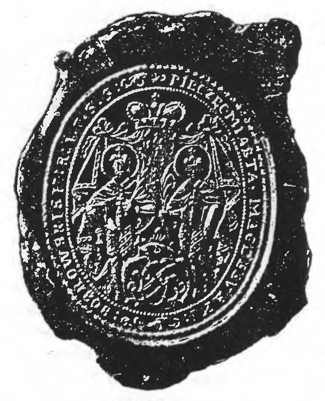 Беларуская (тарашкевіца): Бабр (Bobr). Пячатка з гербам мястэчка